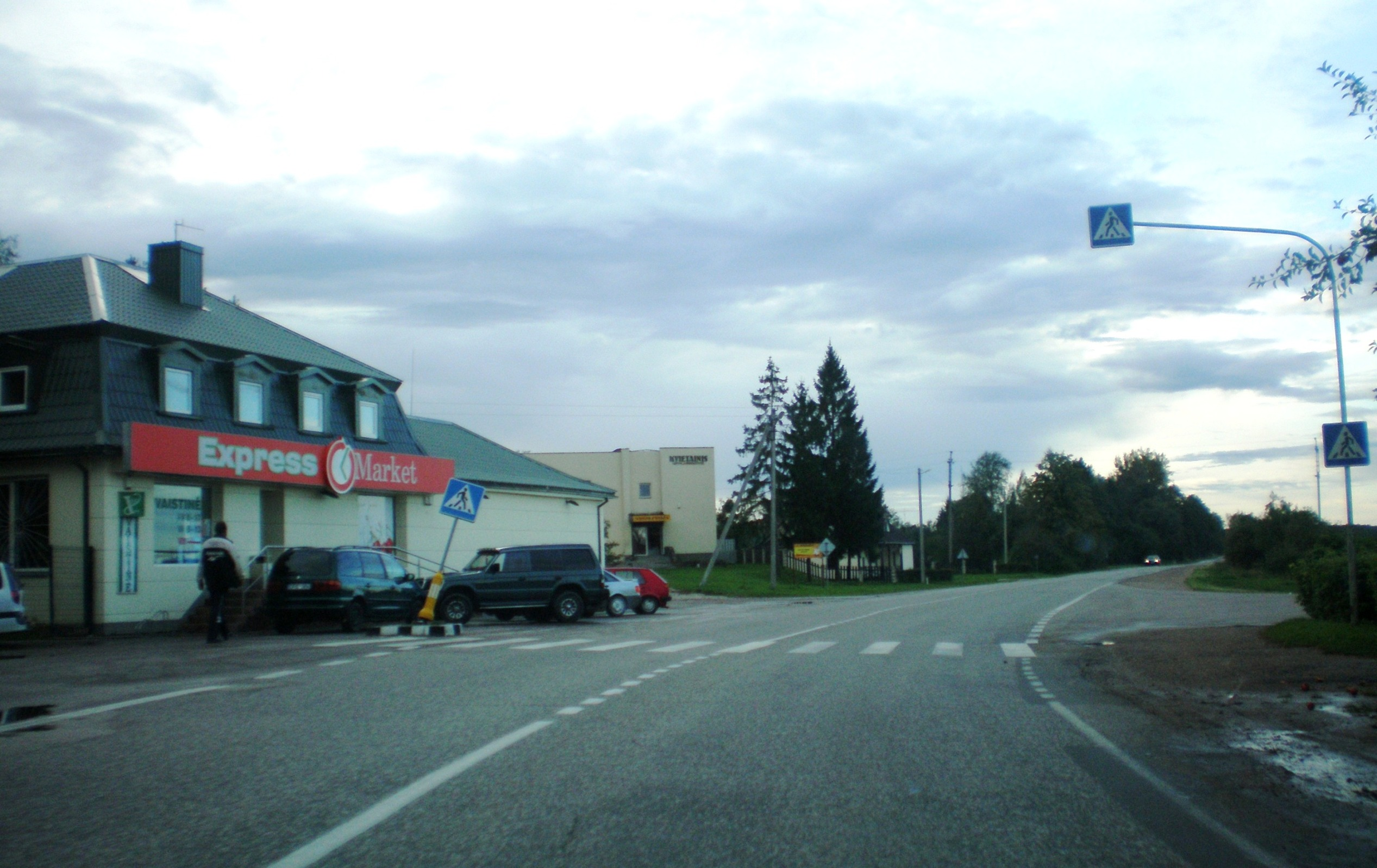 Išlaužas, Prienų raj.